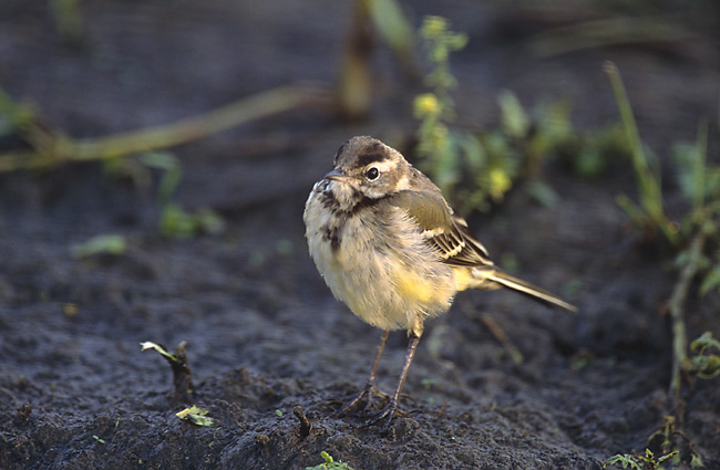 Motacilla flava, young